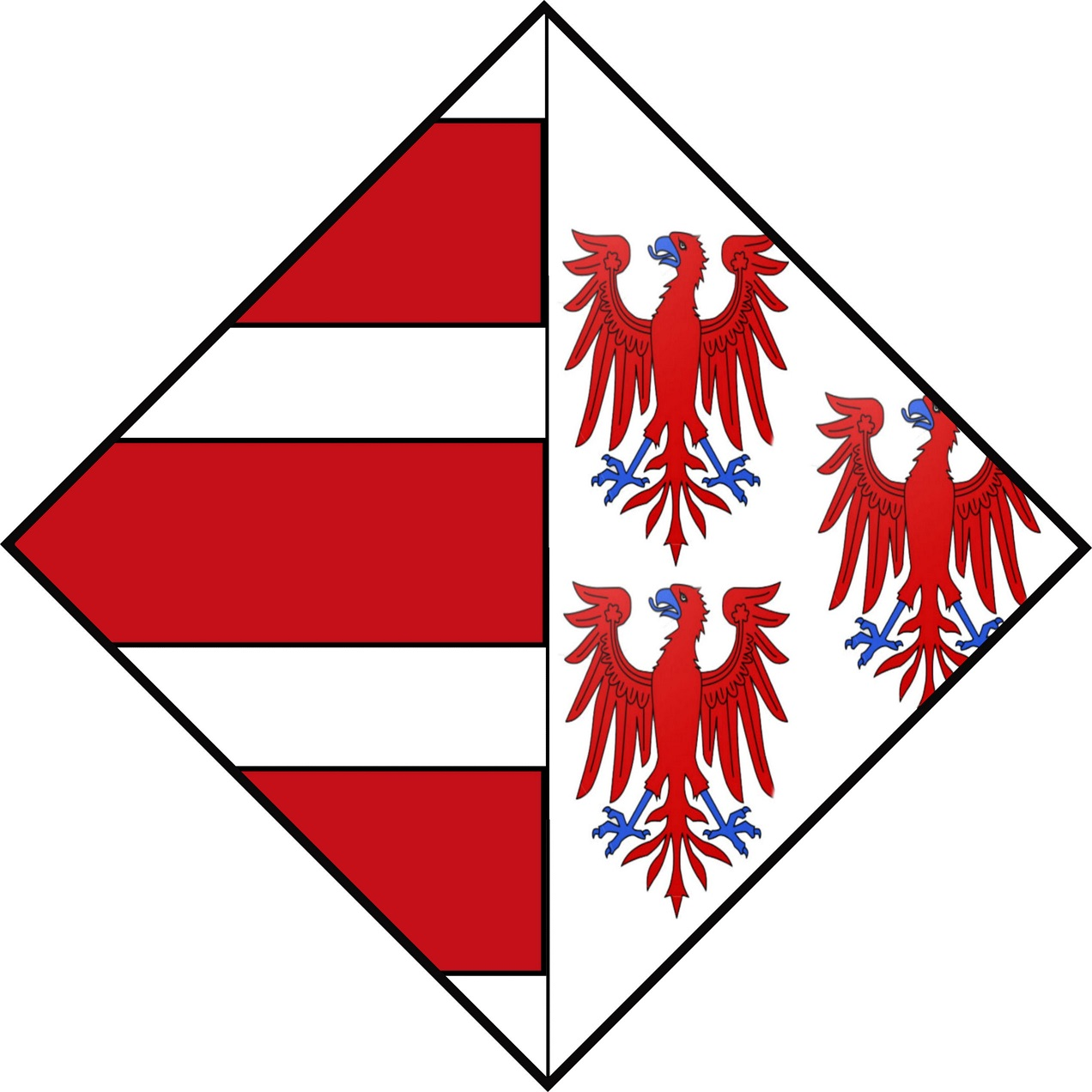 wapenschild alliantie